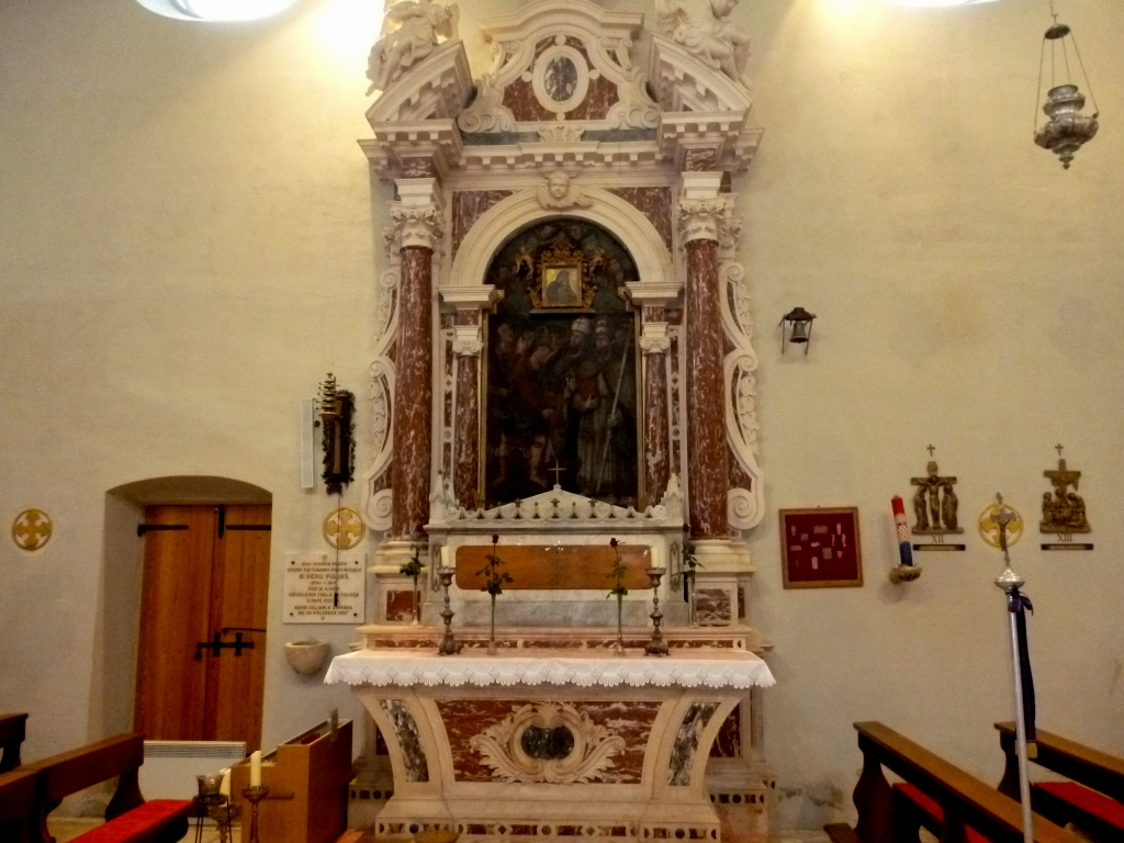 Crkva sv. Ivana Krstitelja u Kaštel Starom: oltar sv. Felicija